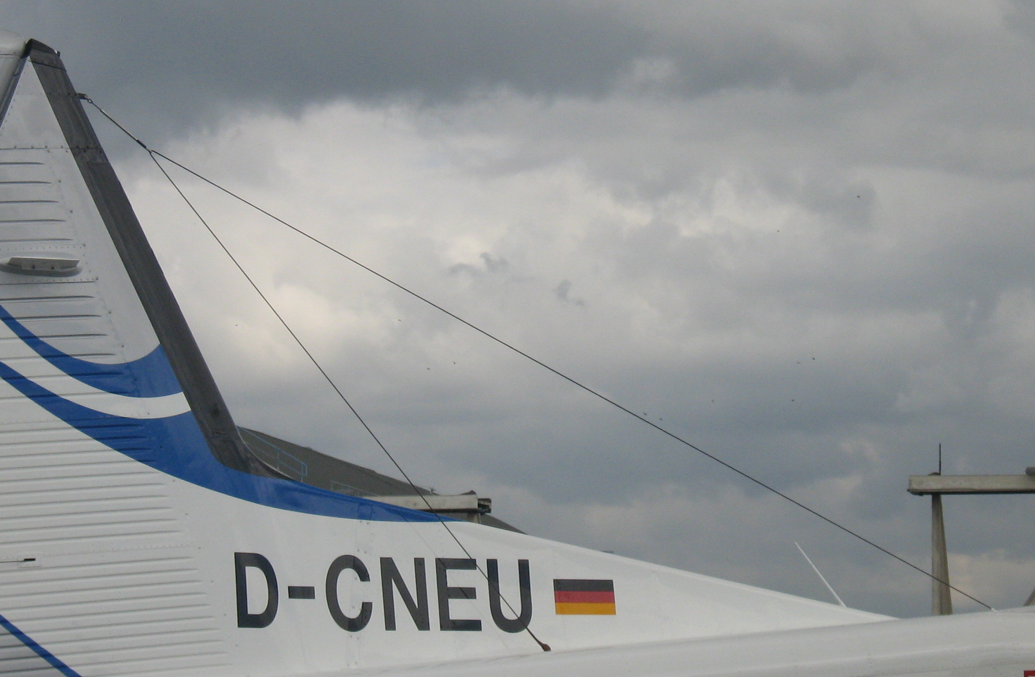 Antenne d’aéronef, antenne oblique en « V » inversé 2 à 23 MHz, tendue de la coque de l'avion à l'arrière, et antenne bande 118 à 137 MHz. Avion D-CNEU Photograph taken at: Paris Air Show, 20 June 2011–26 June 2011